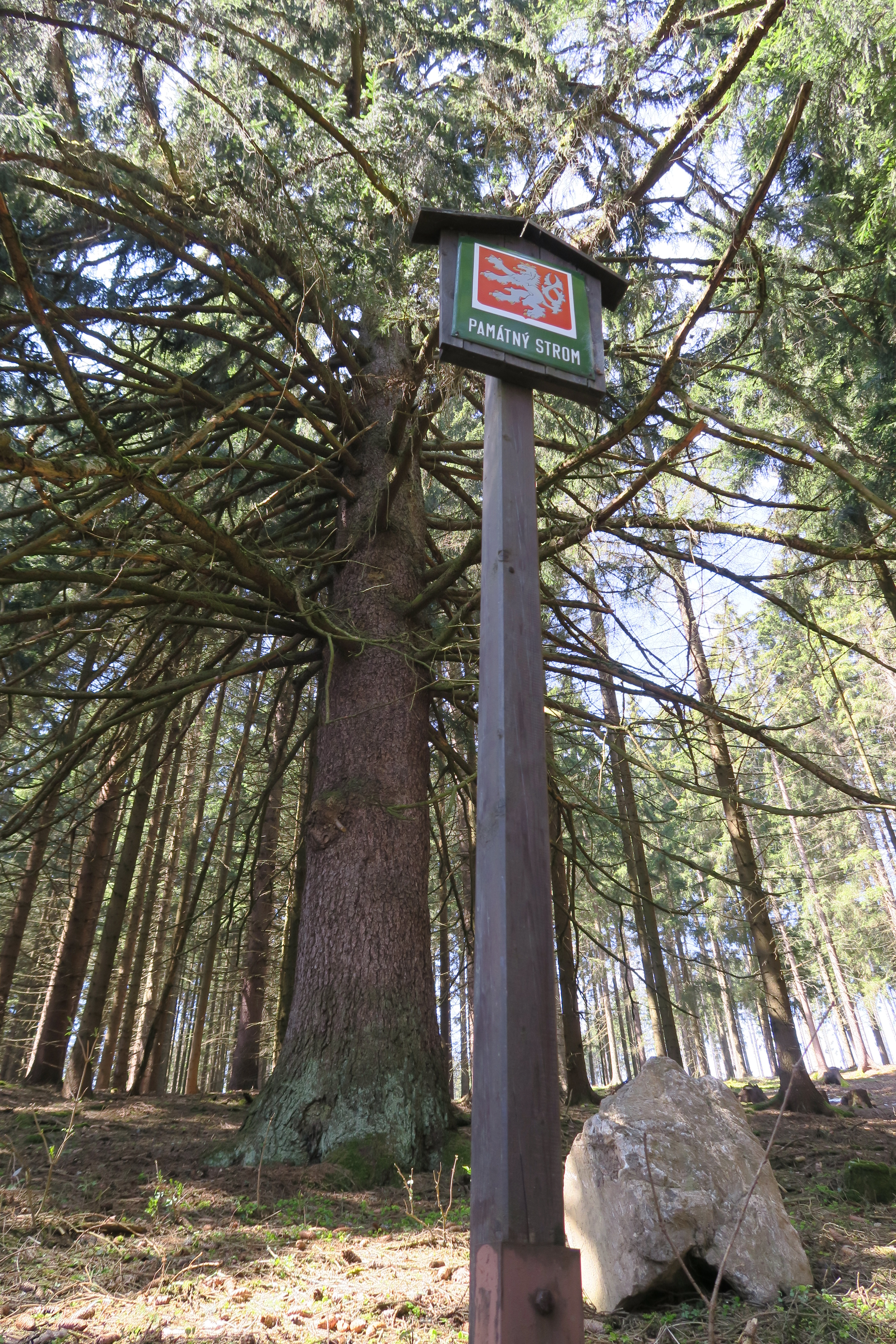 Smrk u Šebestova